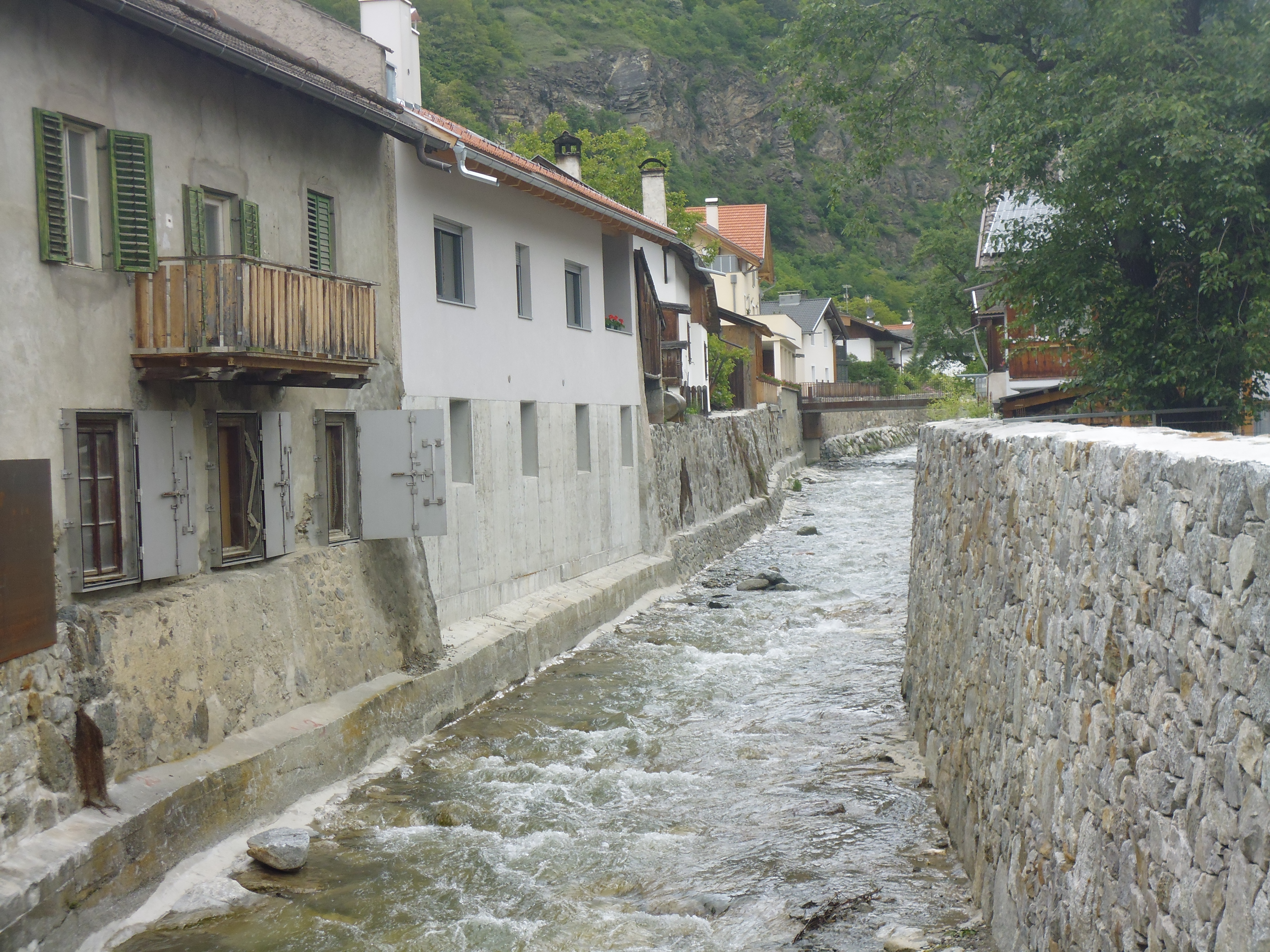 Ansicht von Schluderns mit dem Saldurbach